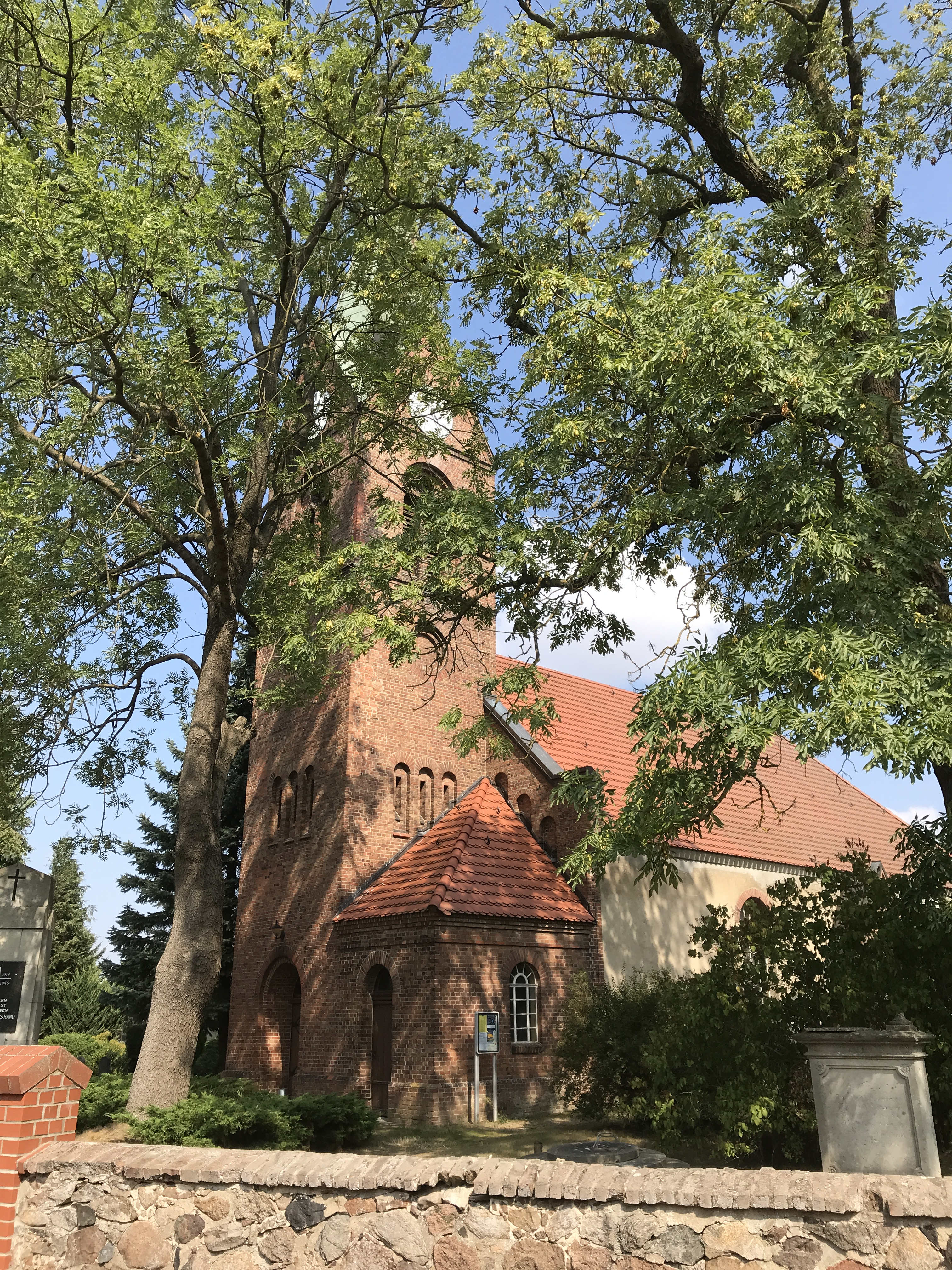 Die Saalkirche in Buchholz der Gemeinde Steinhöfel ist ein mittelalterlicher Bau, der aus Feldsteinen errichtet wurde. Im 18. Jahrhundert wurde die Kirche durchgreifend erneuert. Im Innern steht unter anderem eine barocke Kanzel aus dem Anfang des 18. Jahrhunderts.